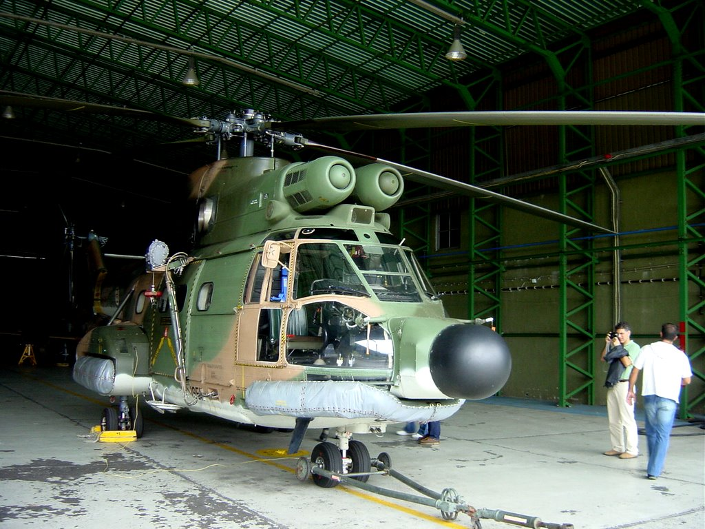 Aérospatiale Puma da Força Aérea Portuguesa, na Base Aérea das Lajes.